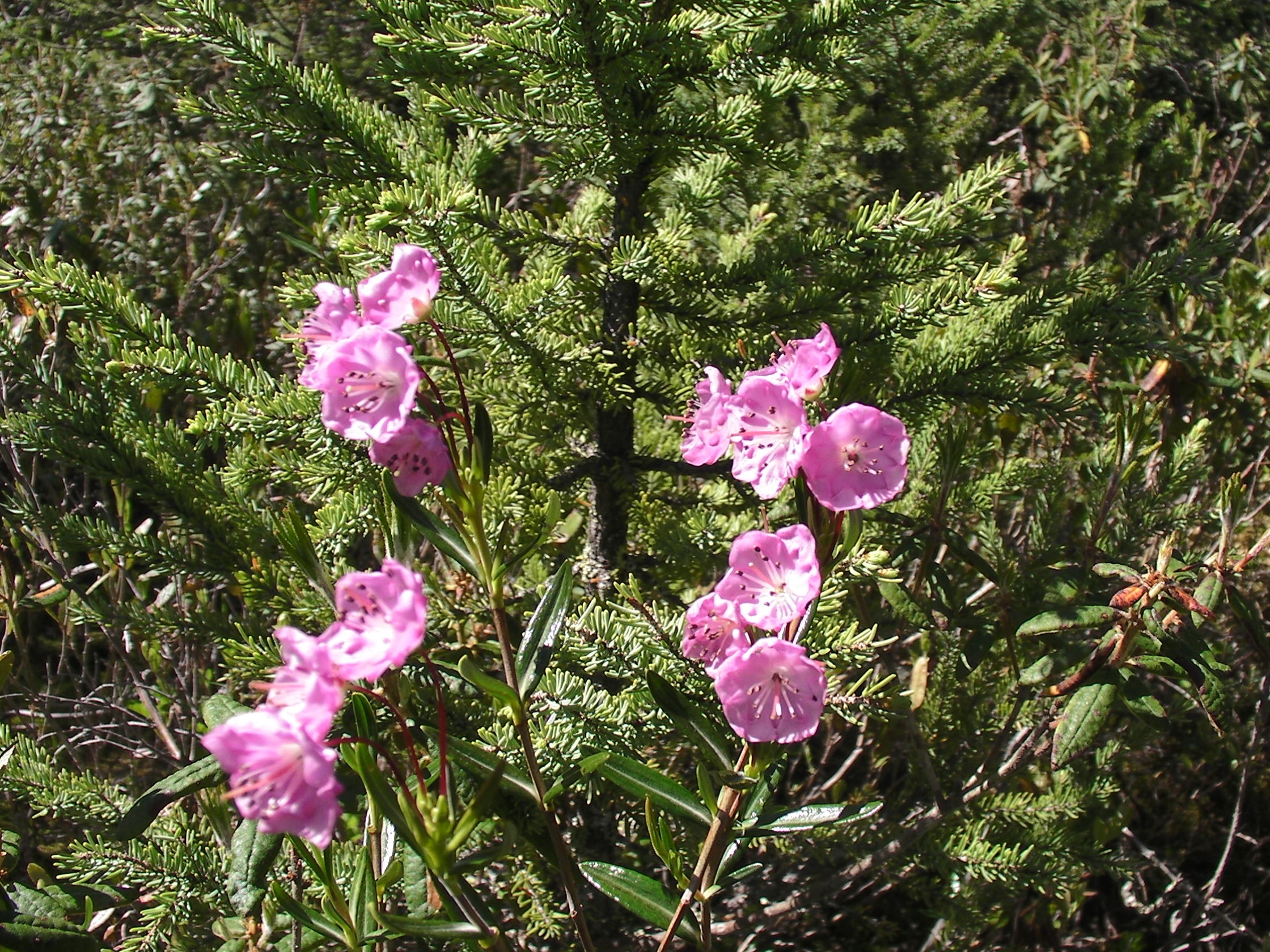 Kalmia à feuilles d'andromède. Bog laurel (Julie)